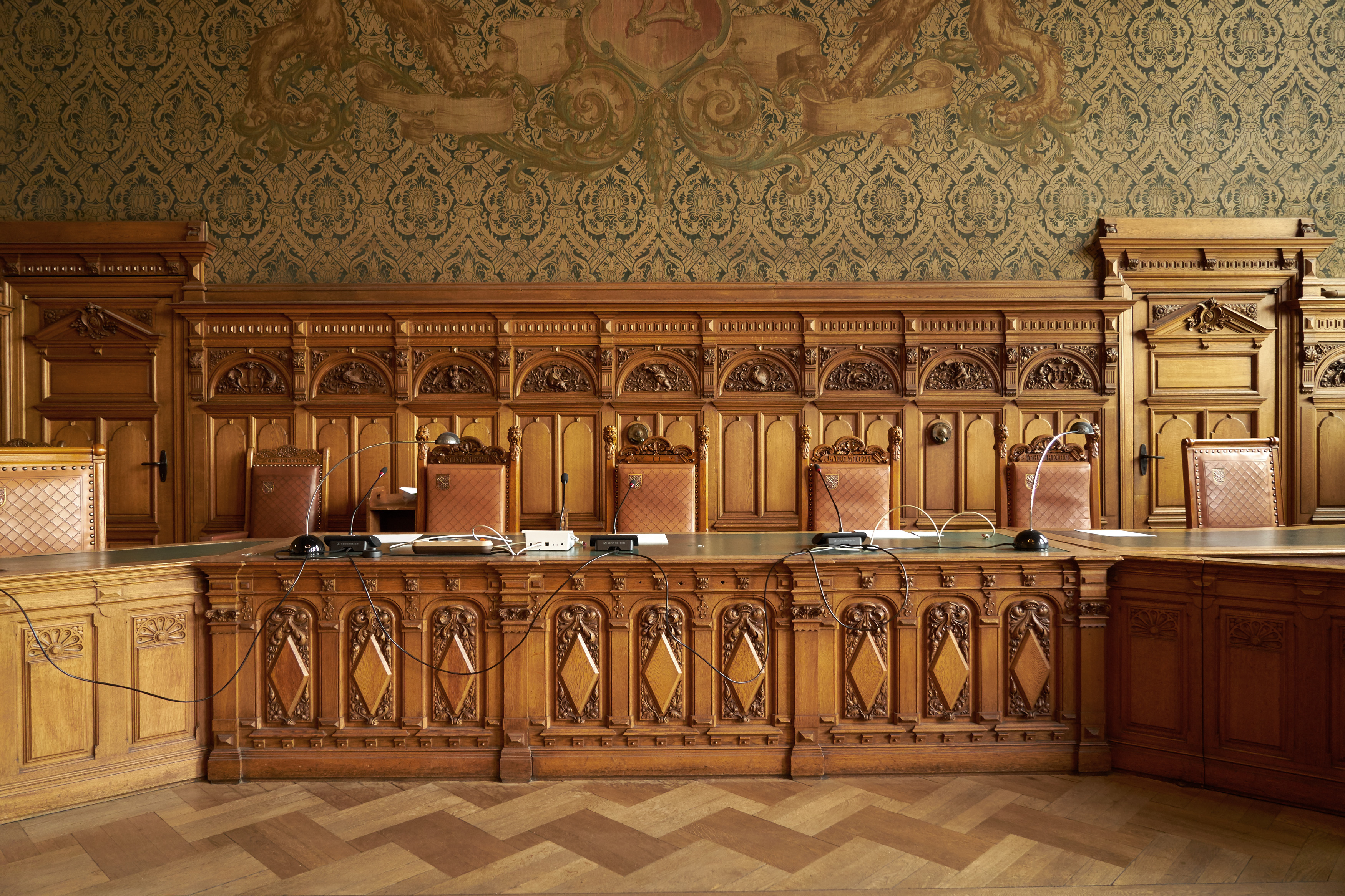 Gerichtsgebäude und Untersuchungsgefängnis in Bremen, Domsheide 16. Schwurgerichtssaal, RichtertischDas abgebildete Objekt ist ein geschütztes Kulturdenkmal in der Freien Hansestadt Bremen, mit der Nr. 0317 beim Landesamt für Denkmalpflege registriert.